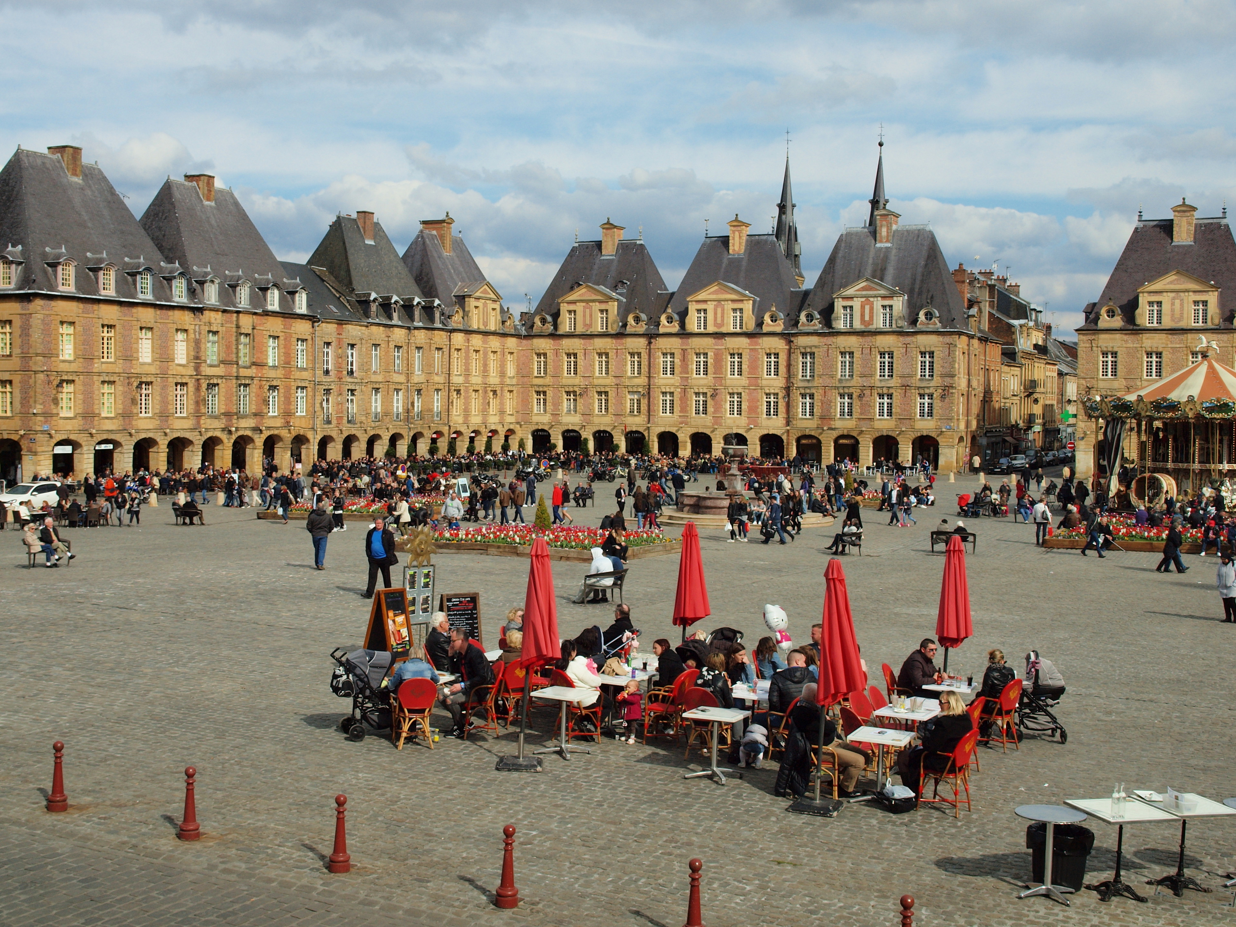 Place Ducale de Charleville-Mézières (Ardennes, France) , par un beau samedi d'avril 2016.